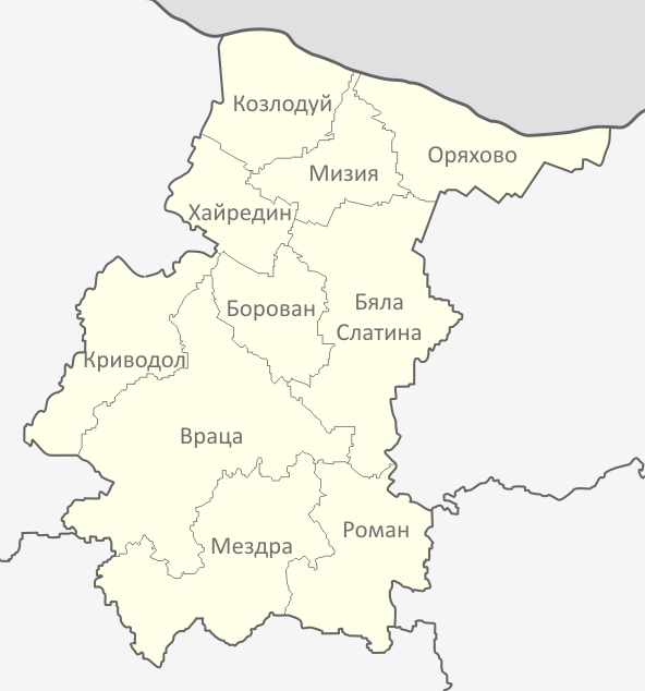 Картата е създадена от Любомир Таушанов (Община Роман е временно поправена от Петко, 24/03/2006, GFDL)